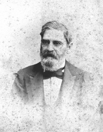 Barão do Amparo